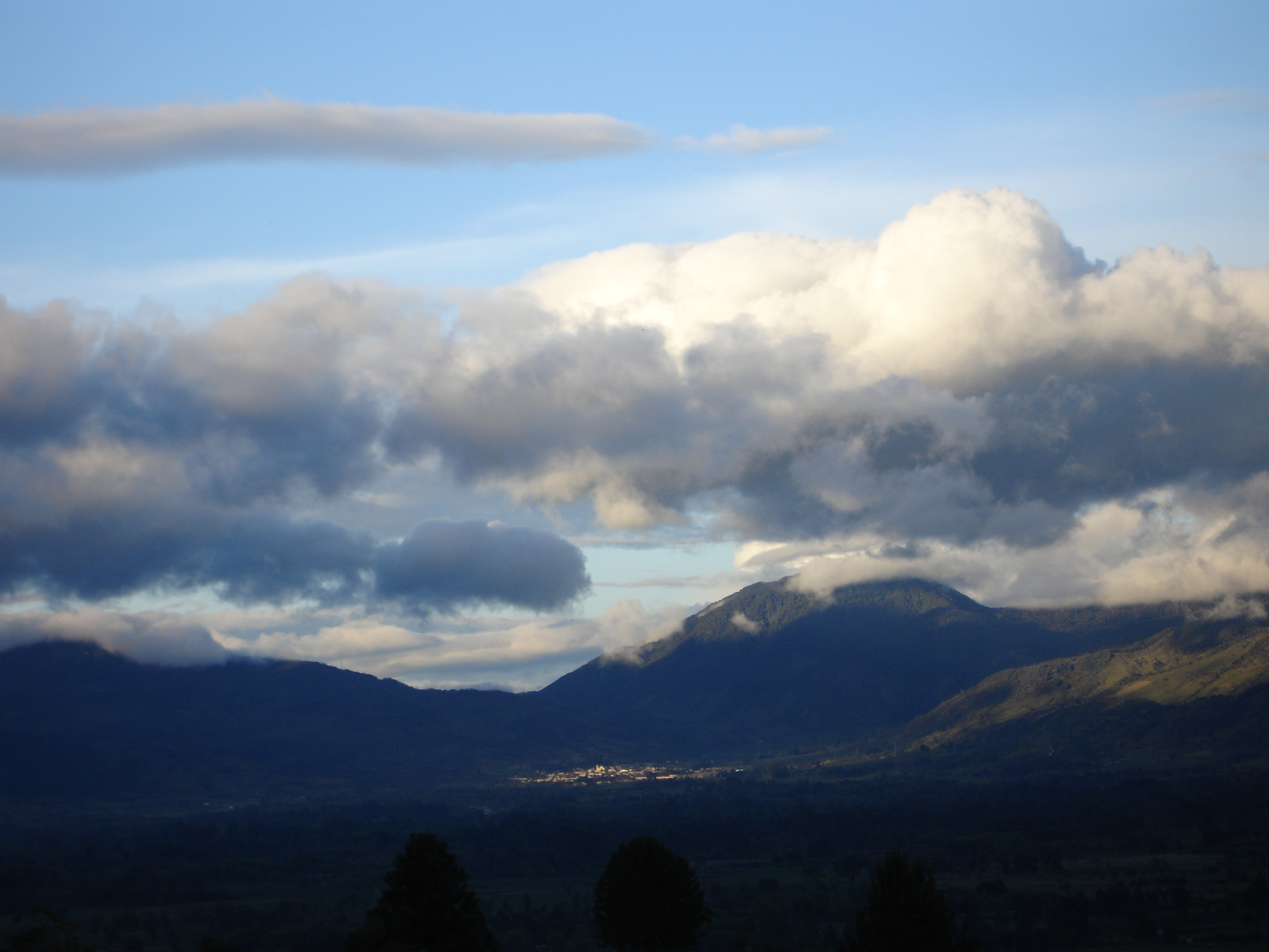 En el departamento de Putumayo (Colombia), está ubicado el Valle de Sibundoy. En él, los Municipios de Santiago, Colon y San Francisco. Esta región se caracteriza por sus hermosos paisajes, recursos hídricos y gente amable. La foto muestra la cabecera municipal de San Francisco, tomada desde el municipio de Santiago.